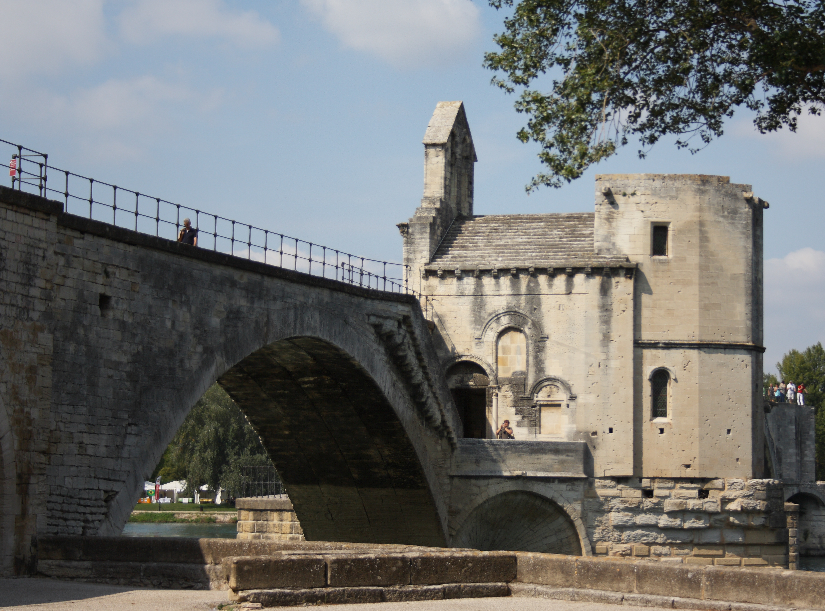 Kapelle Saint-Nicolas auf der Brücke Saint-Bénézet in Avignon